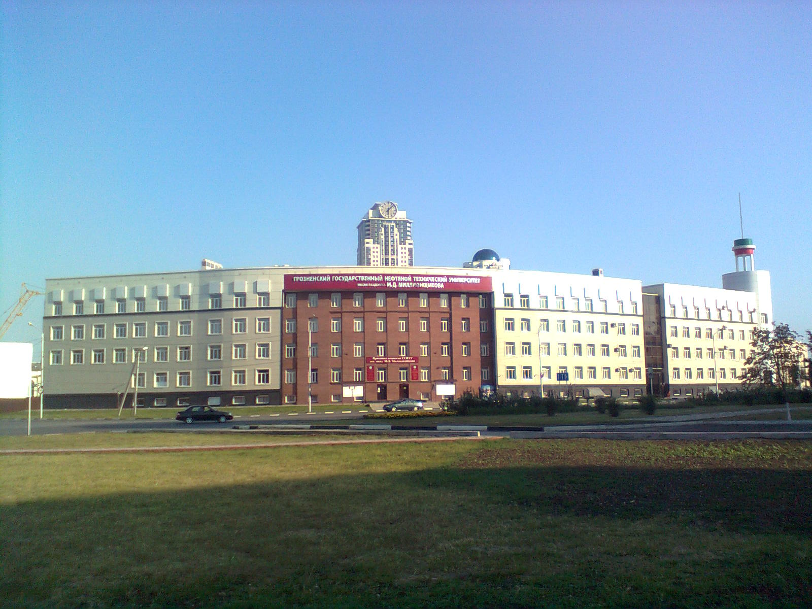 Грозненский нефтяной университет